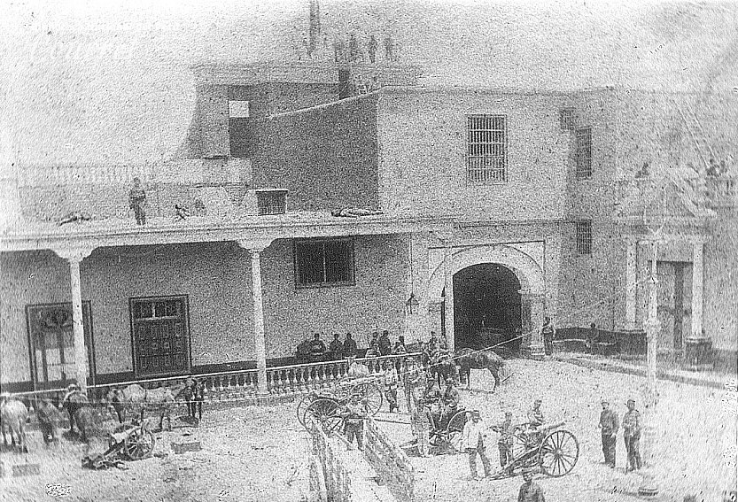 Antiguo Palacio de Gobierno del Perú –– Uno de los Patios ocupados por los revolucionarios pierolistas en 1895.